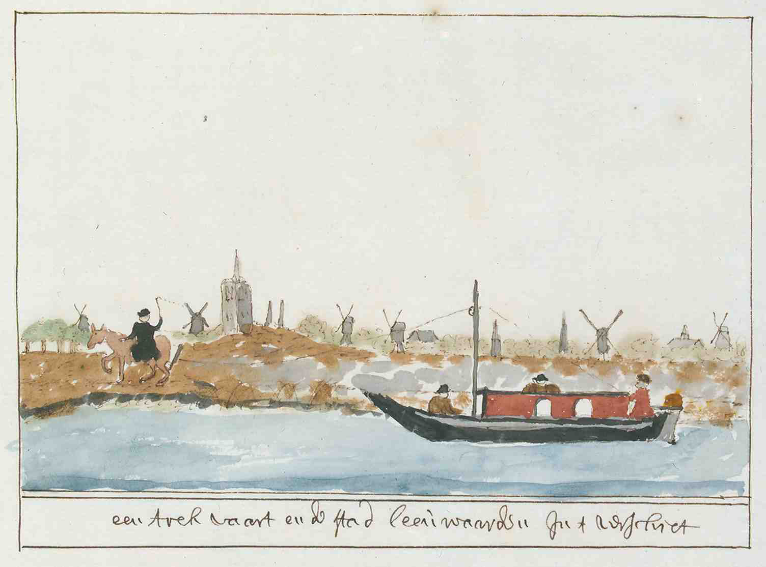 Korte Beschreijving van de Steden Dorpen Gehugten en Heeren-huizen der Heerlykheid Vriesland Benevens Desselfs Afbeeldingen Meest na 't leven getekent By een Vergaderdt Door Andries Schoemaker